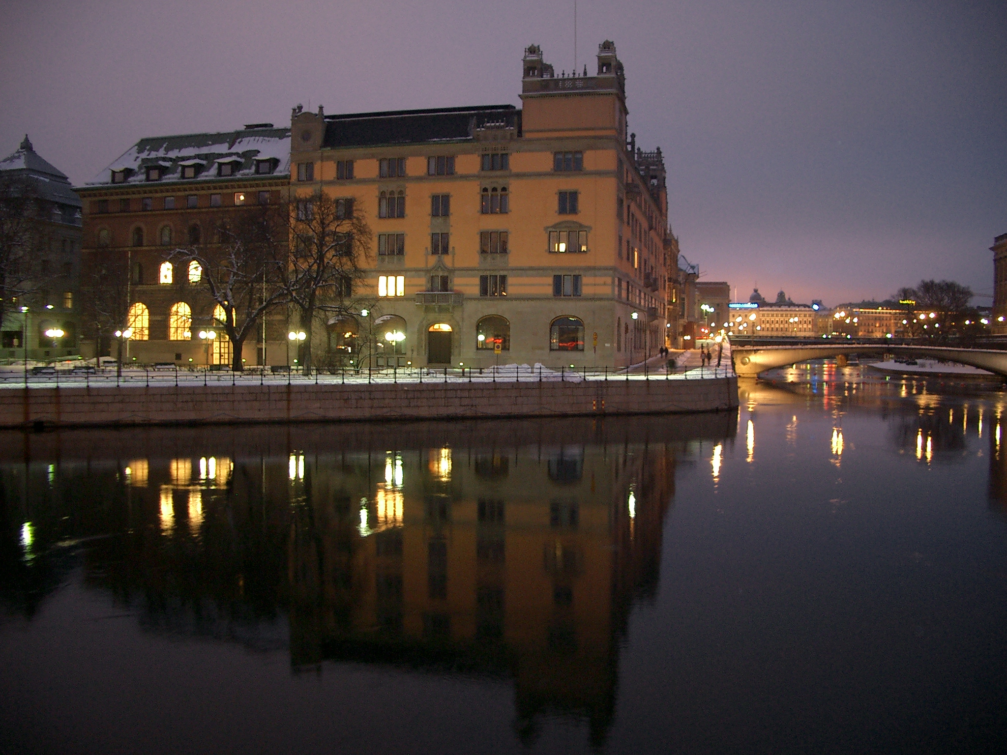 Rosenbad